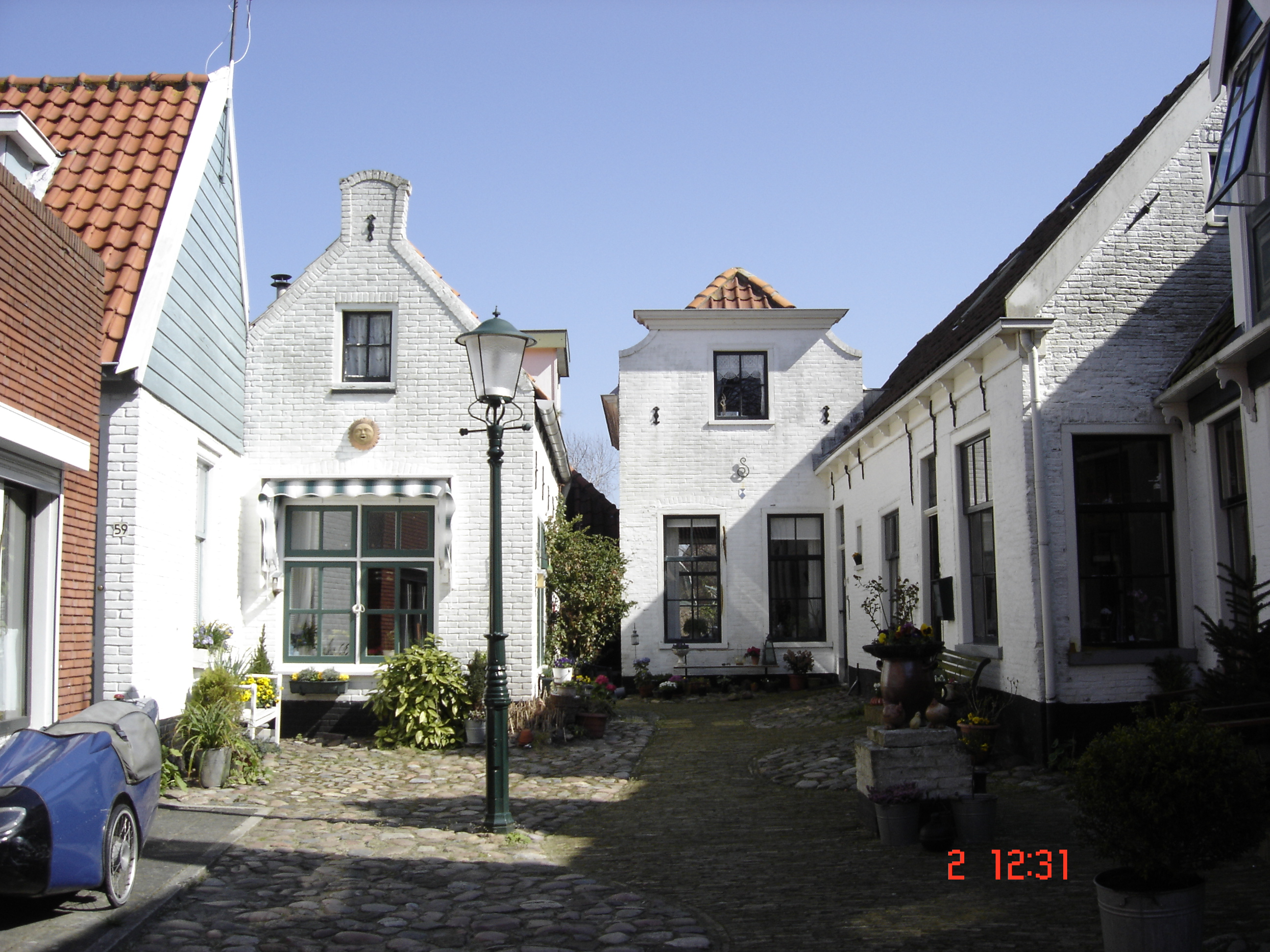 Hofje Den Burg